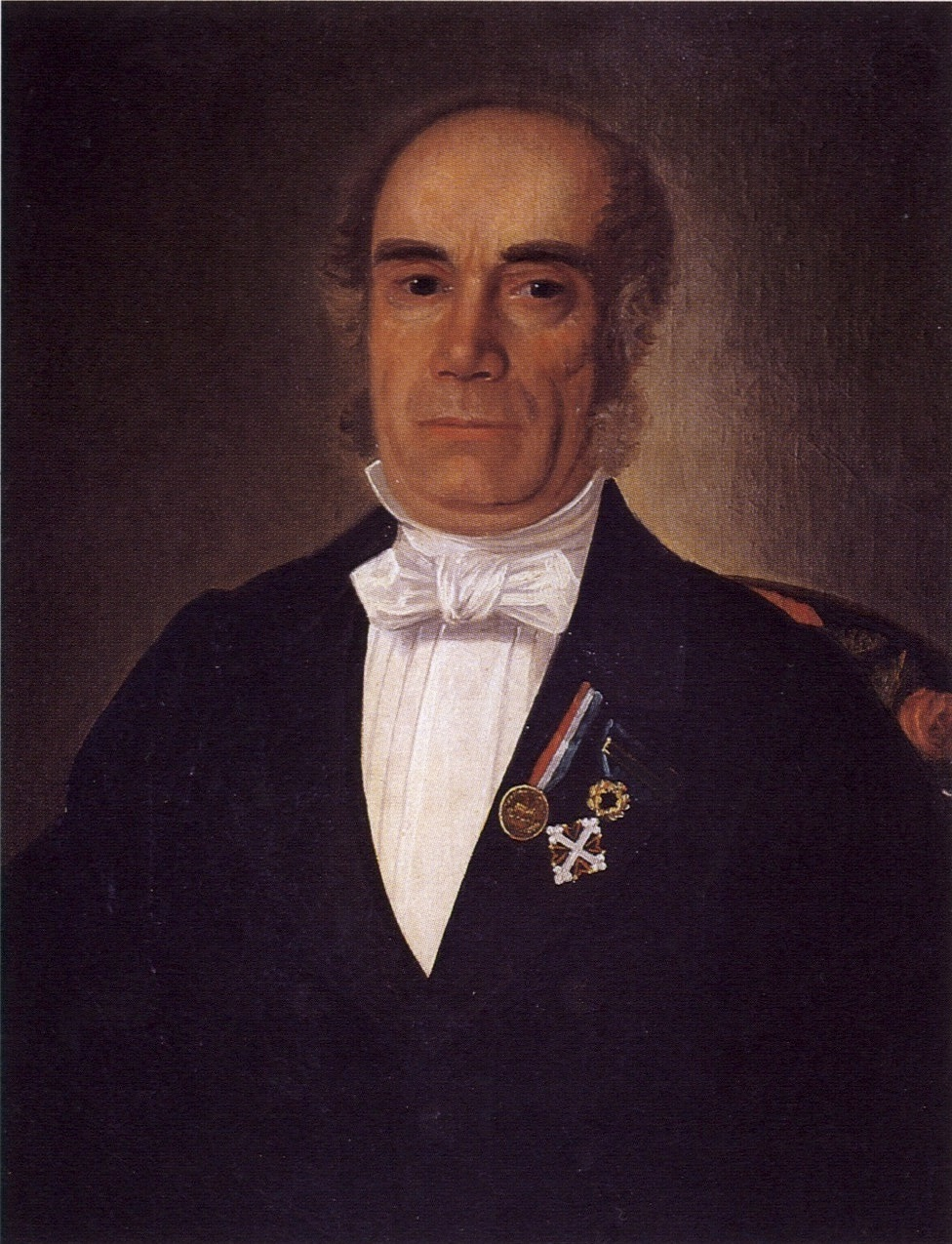 ritratto del Barone Emmanuel Bich (1800-1866), figlio di Jean-Jacques-Pantaléon Bich e Philippine Passerin d'Entrèves. Sposo il 10/12/1827 di Josephine-Aspasie Bich Barillier. Proprietario del Castello di Montfleury, Aosta, Valle d'Aosta, Italia. Olio su tavola.